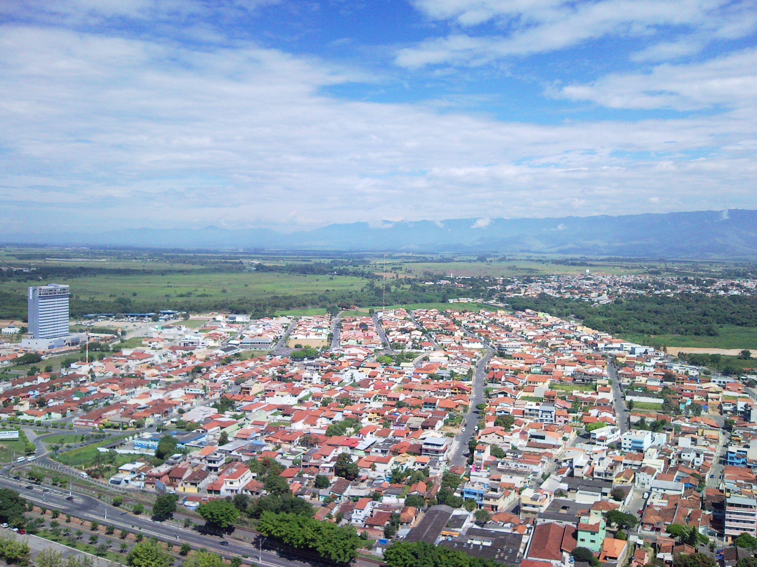 Vista da torre da Basílica de Aparecida com Vistas para o Bairro Jardim Paraíba e Cidade de Potim SP. Ao fundo a Serra da Mantiqueira